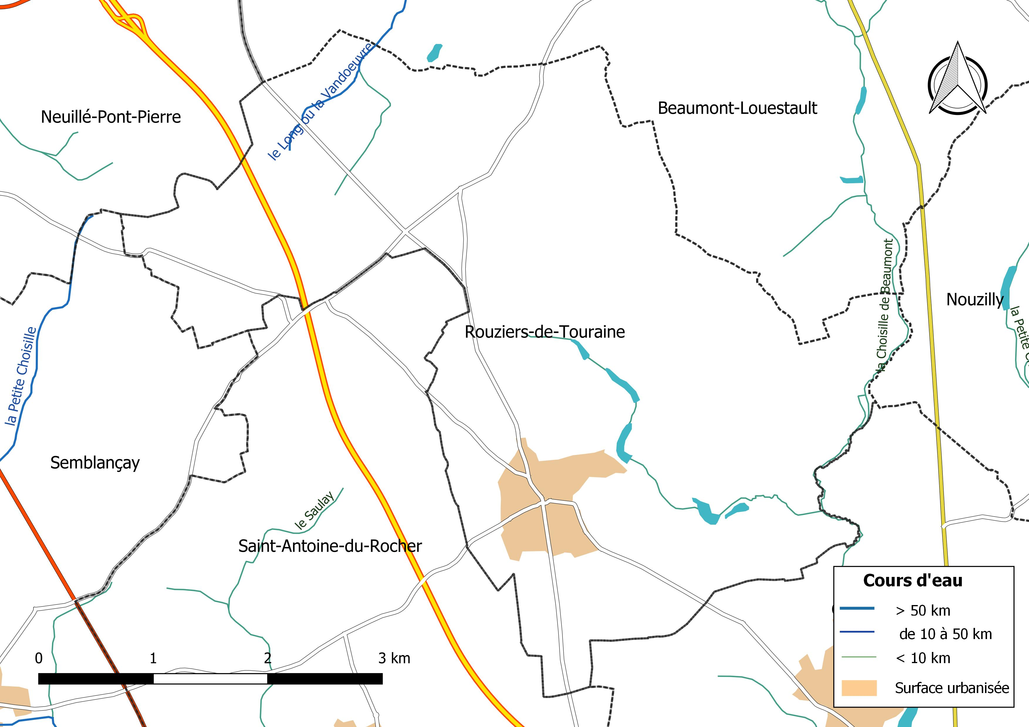 Carte du réseau hydrographique de la commune de Rouziers-de-Touraine (France).